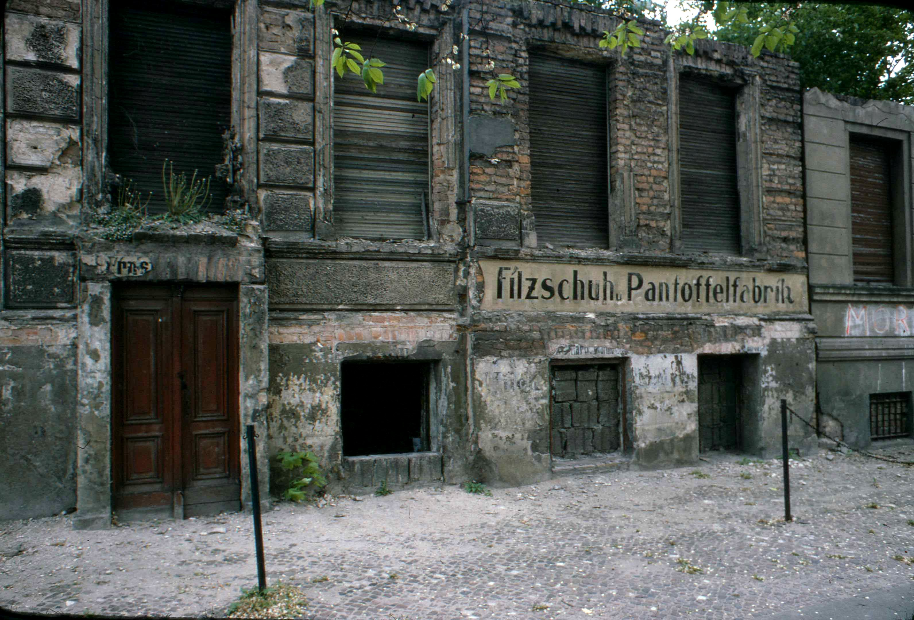 Eckhaus Bernauer Straße 44 / Wolliner Straße, hier zur Bernauer Straße, Rosenthaler Vorstadt, Mitte, Berlin Buildings bricked up to form part of the 'Berlin Wall' before the wall was built. The building on the right was a 'felt shoe and slipper factory' at some time.